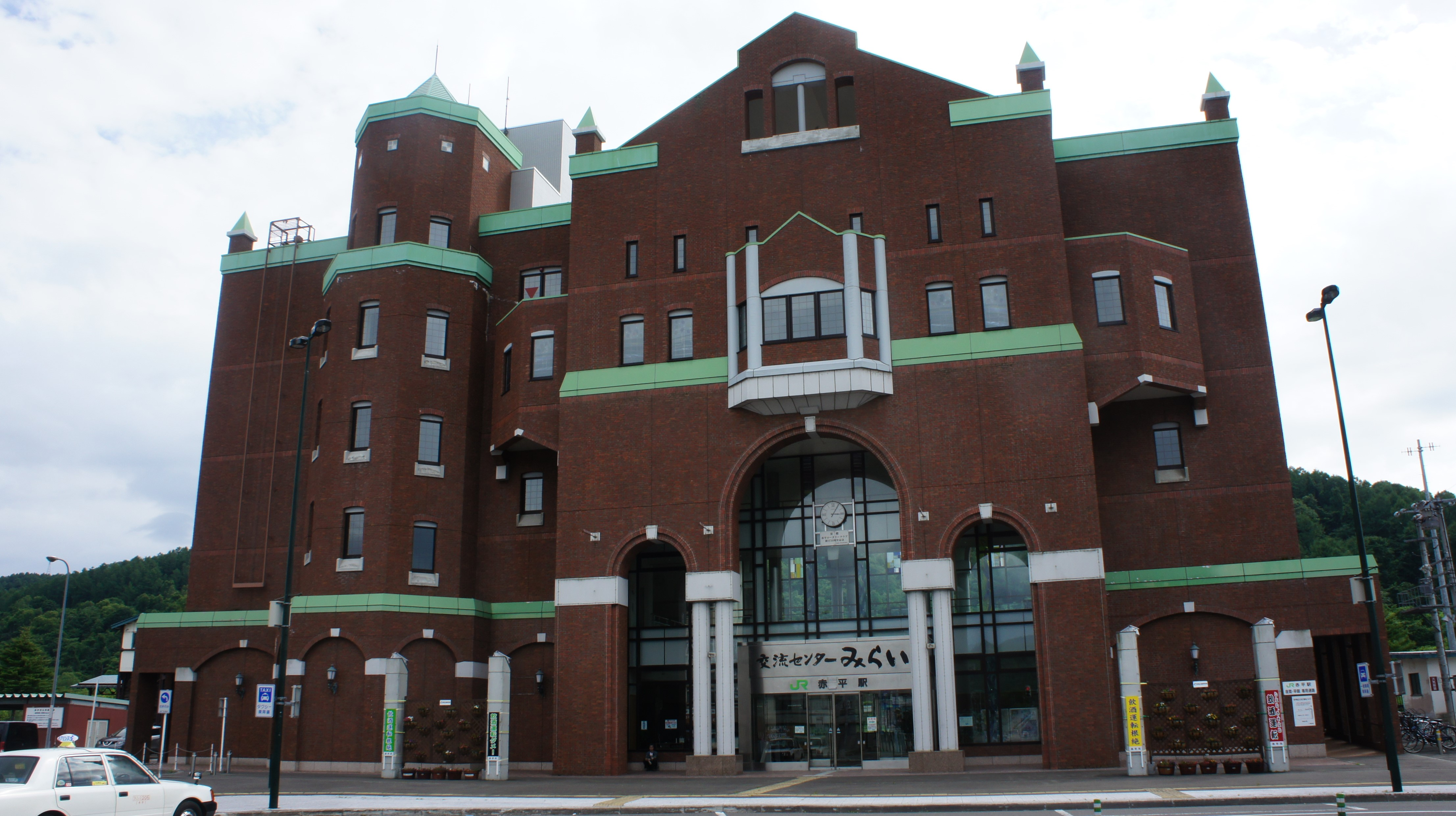 JR根室本線・赤平駅の駅舎